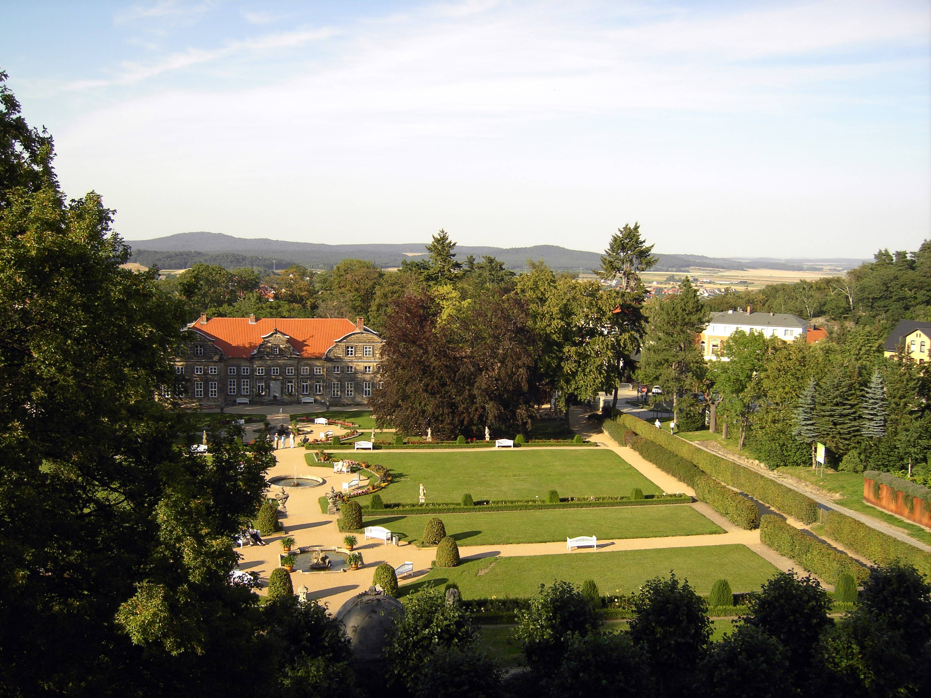 Blankenburg (Harz). Das Kleine Schloss mit Parkanlage